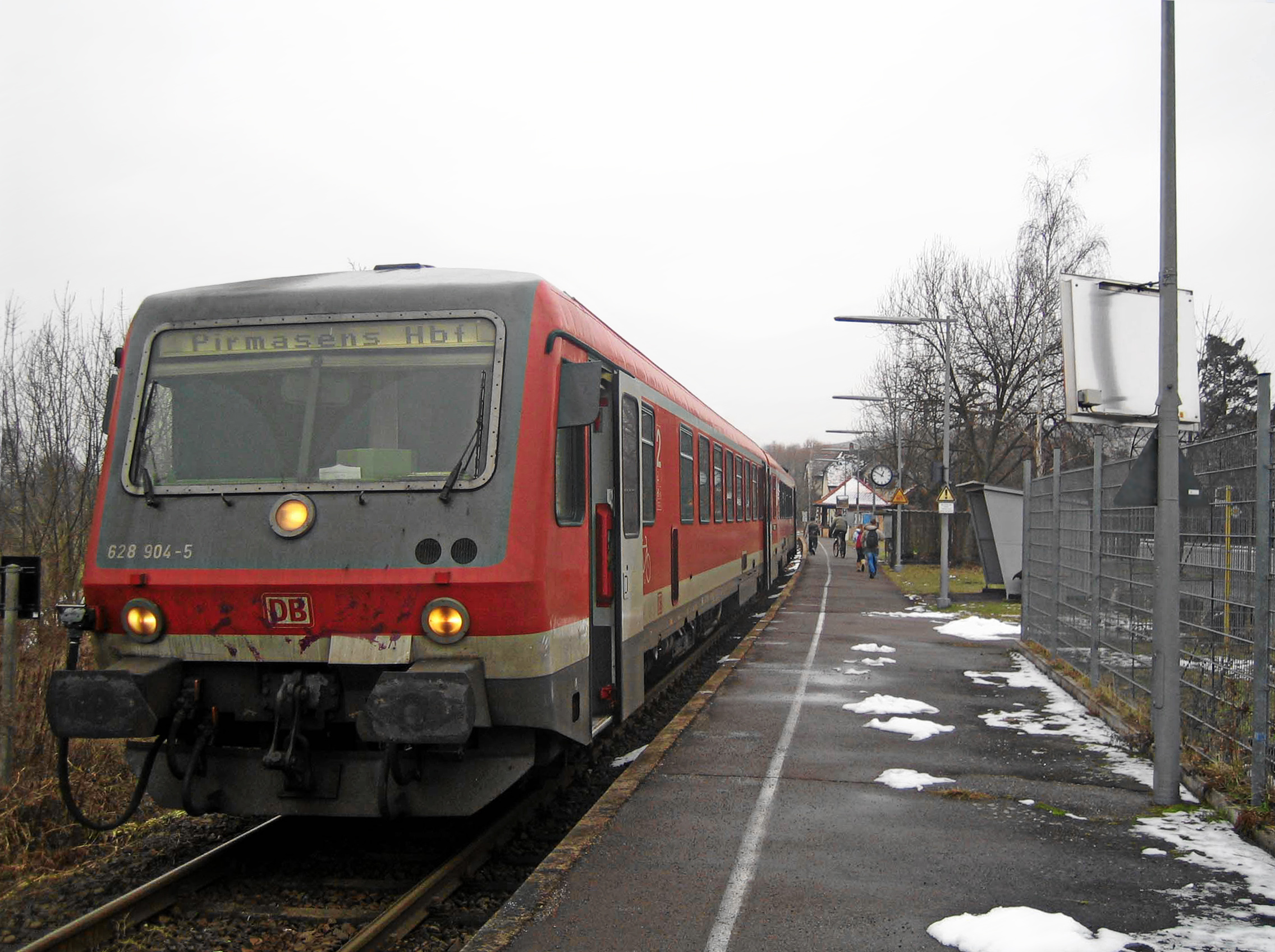 Halptepunkt Siebeldingen-Birkweiler